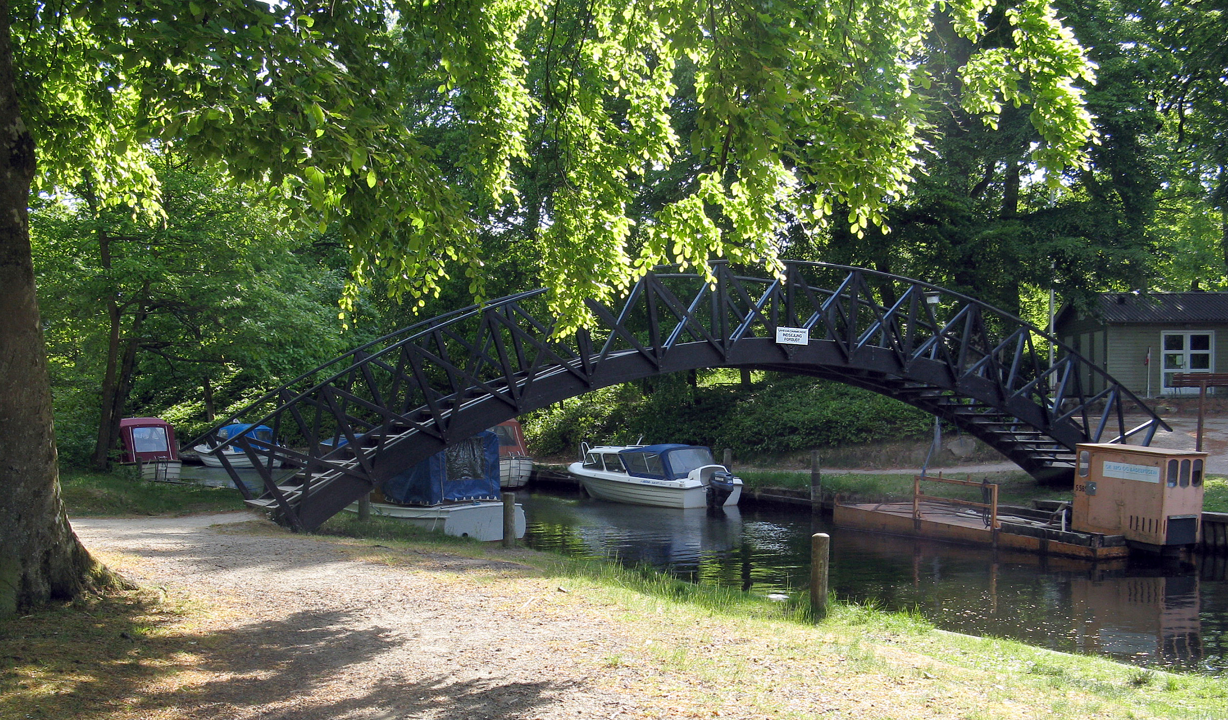 Indelukket i Silkeborg, Denmark